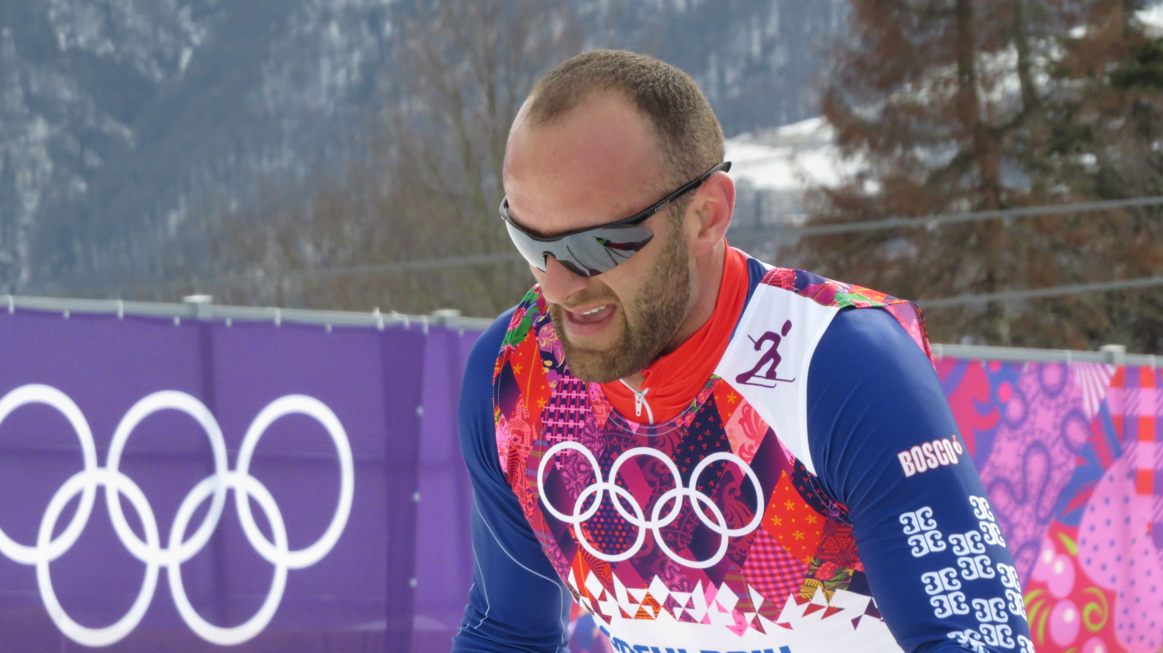 Лыжные гонки на зимних Олимпийских играх 2014 — 15 км классическим стилем (мужчины)